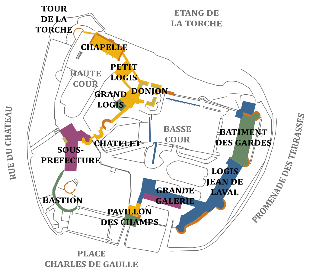 Plan du château de Châteaubriant, montrant les différents éléments et leur époque de construction.